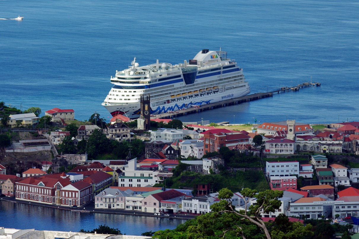 AIDAluna im Hafen von St,. George's,Grenada